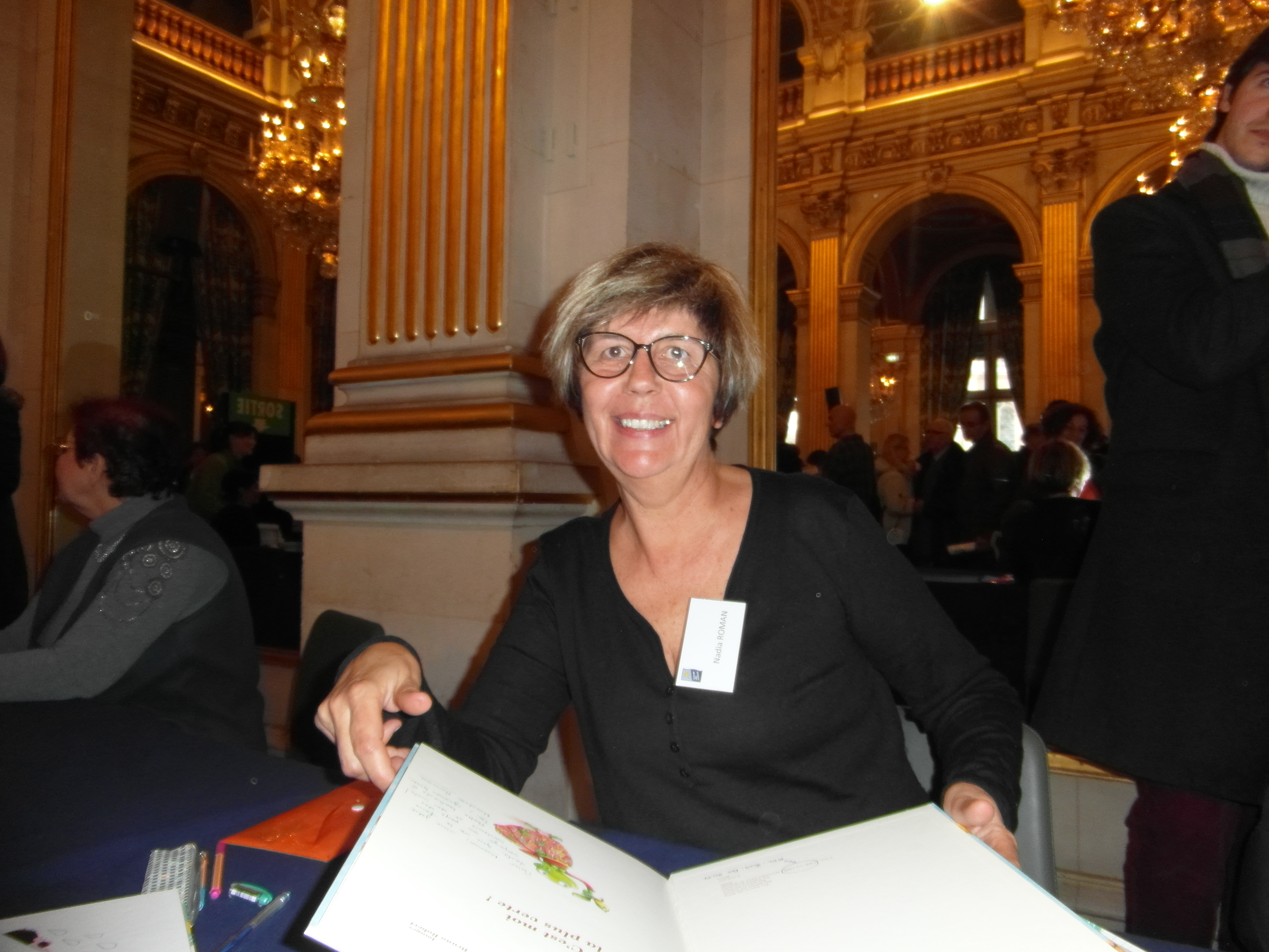 20e Maghreb des Livres, Paris, 8 février 2014